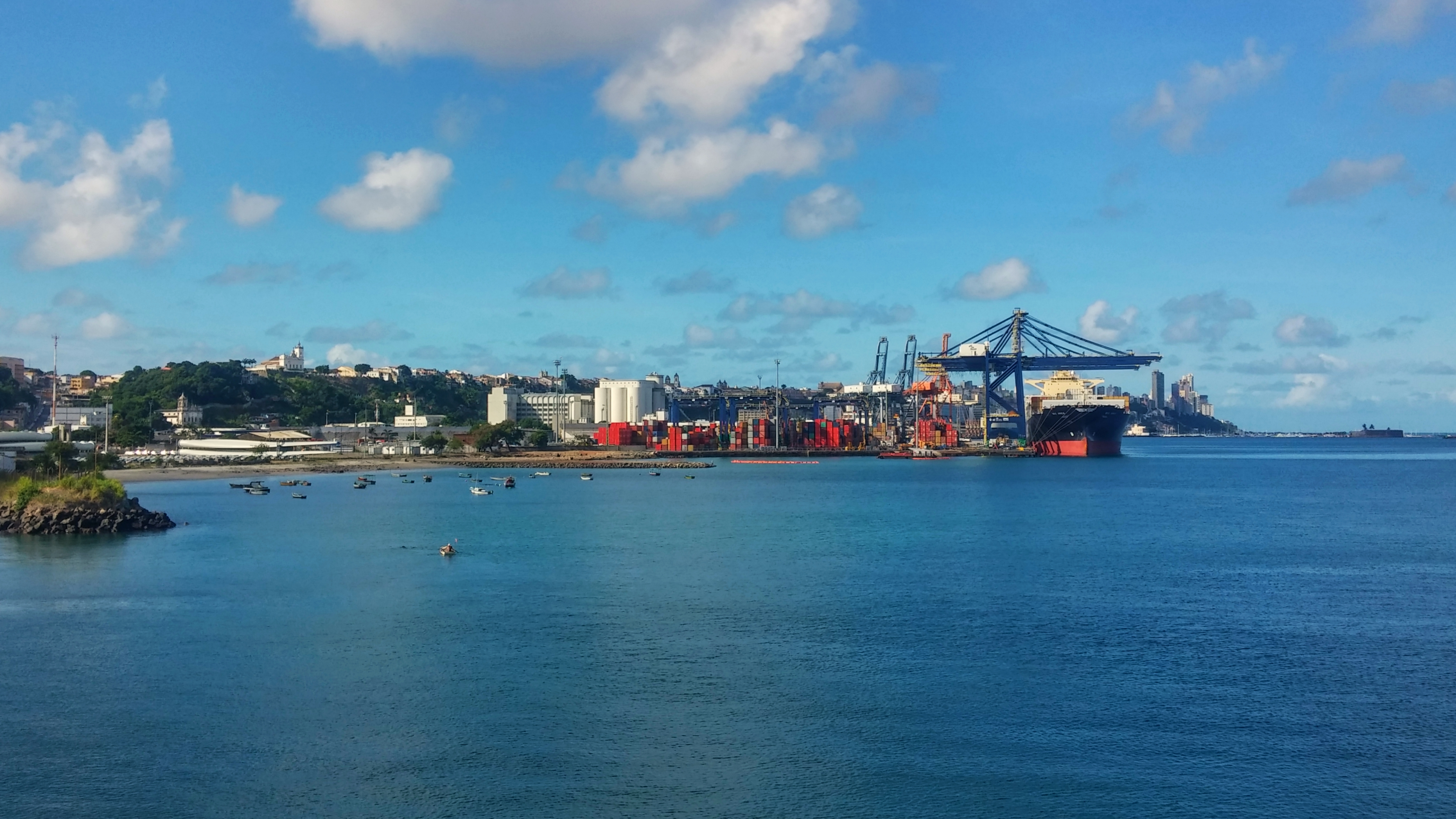 Terminal de Cargas do Porto de Salvador/BA